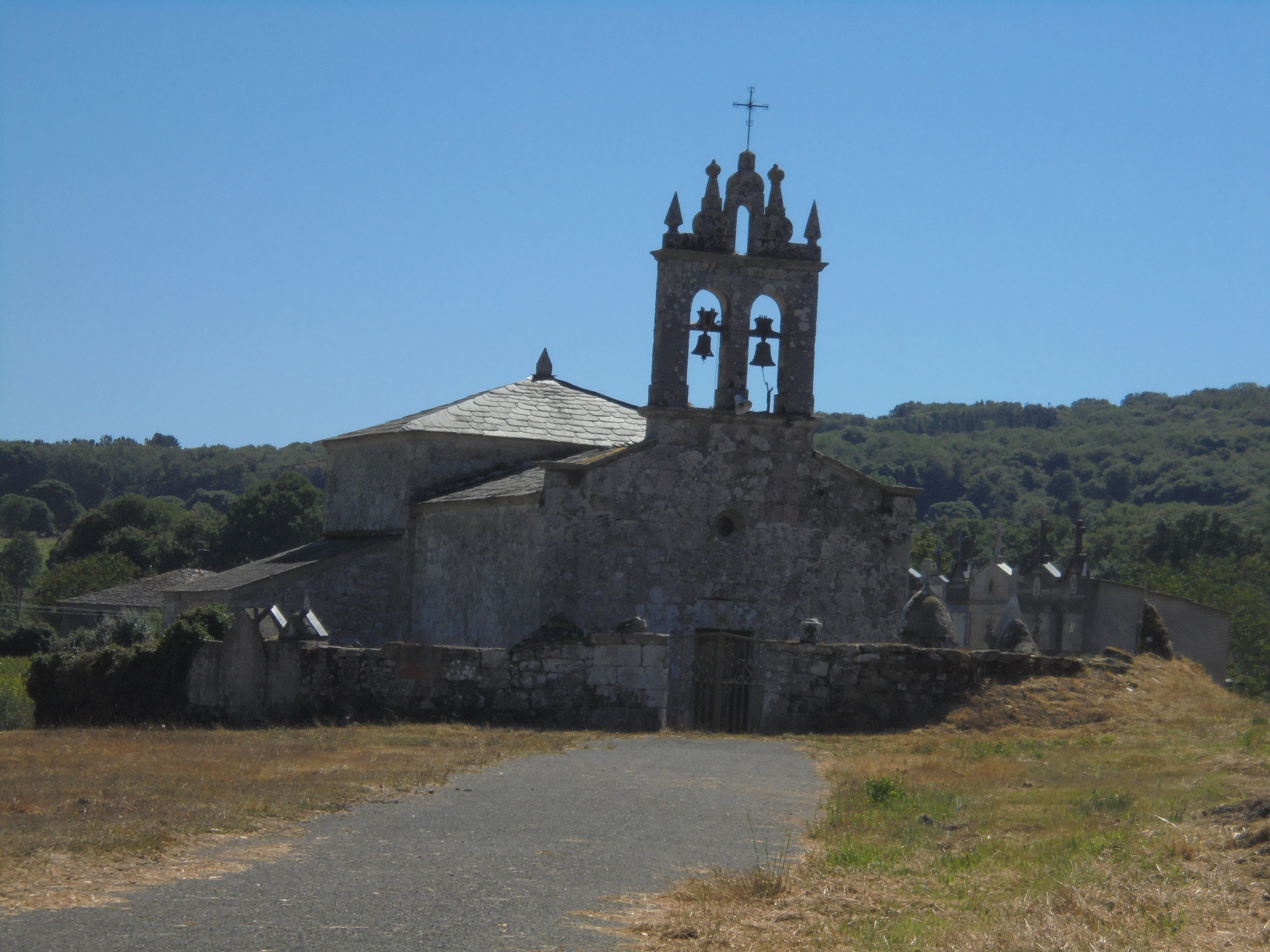 Igrexa parroquial de San Martiño de Poutomillos ( Lugo)